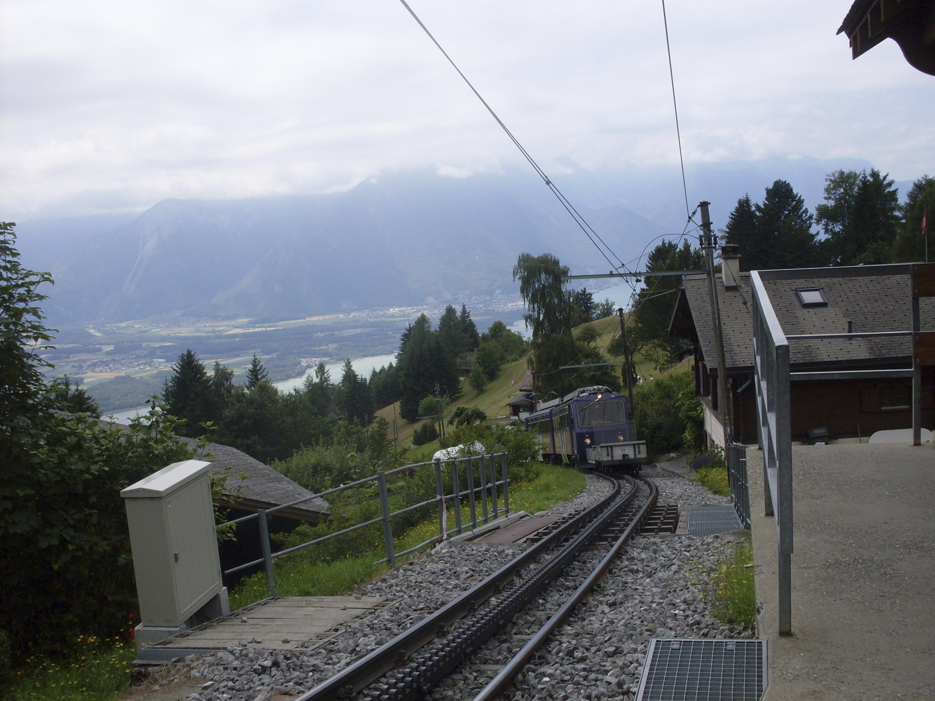 Haltestelle Haut de Caux, Schweiz